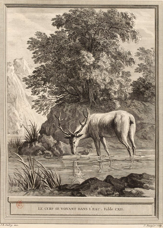 Gravure réalisée par Jacques Jean Pasquier d'après un dessin de Jean-Baptiste Oudry représentant la fable Le cerf se voyant dans l'eau de Jean de La Fontaine (fable 9 du livre VI). Cette gravure est parue dans l'édition complète des fables de La Fontaine, parue en quatre tomes chez l'éditeur Desaint & Saillant, rue saint Jean de Beauvais à Paris, 1755-1759.